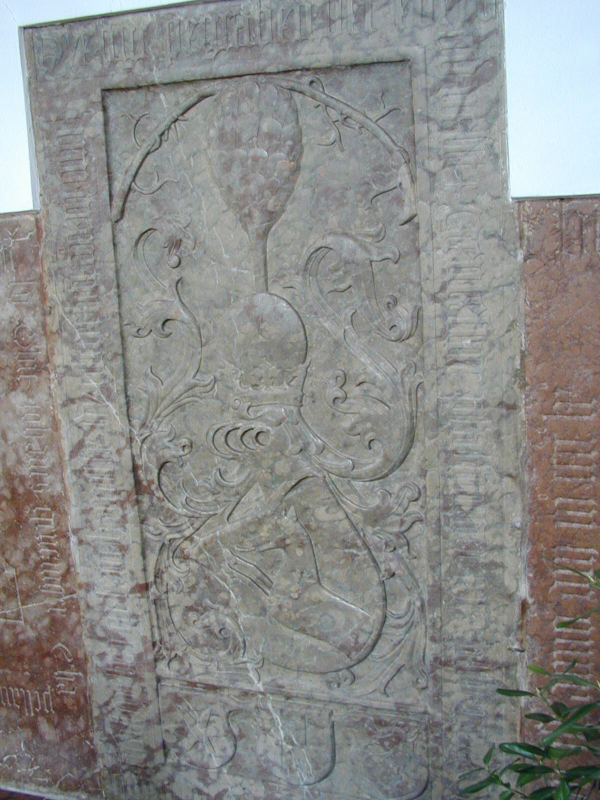 Grabstein des Gentiflor Pfäffinger in der Kirche von Salmanskirchen bei Ampfing in Bayern, Deutschland. Roter Marmor. Unbekannter Künstler um 1505.